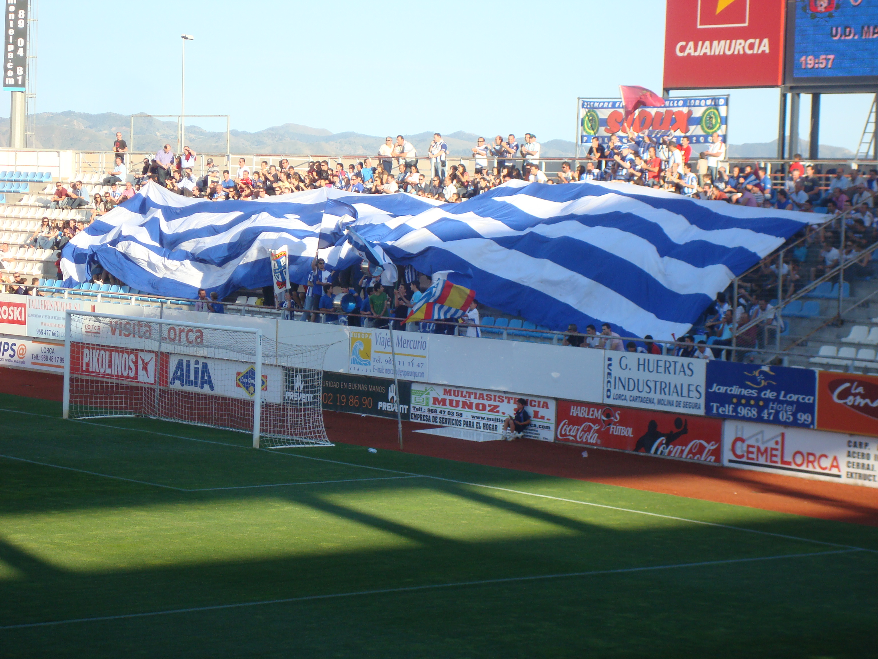 Fondo sur del Artés Carrasco en el partido contra el Marbella de la promoción de ascenso a Segunda División 2009